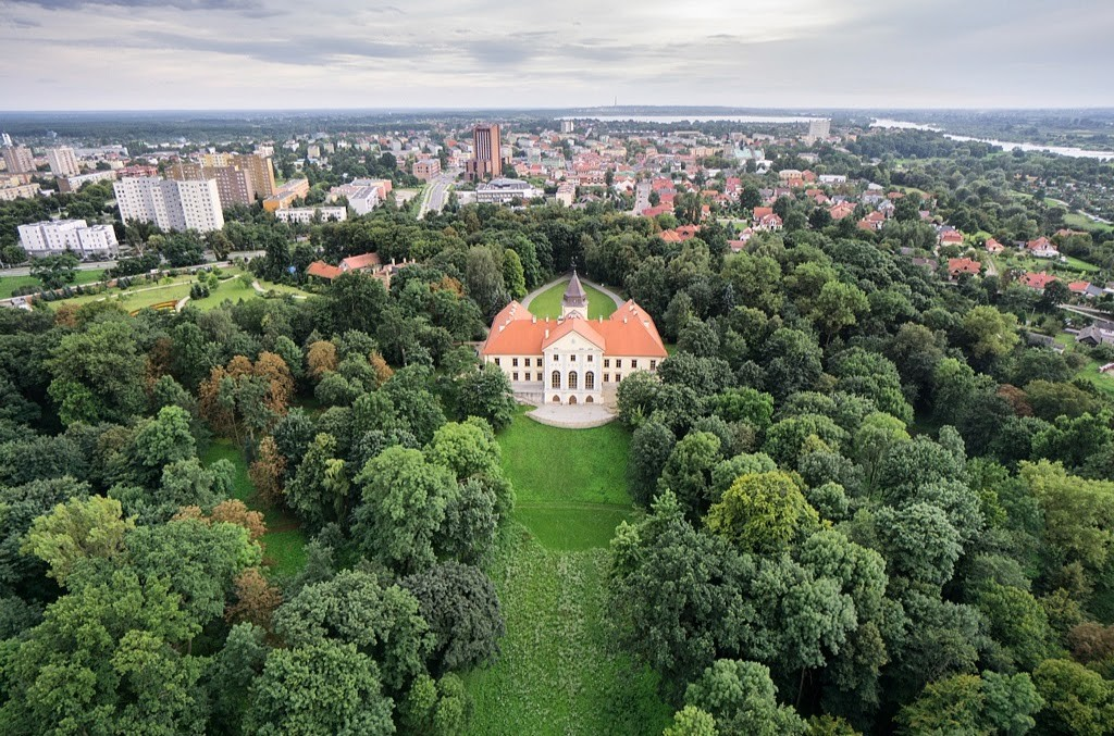 Дворец Тарновских